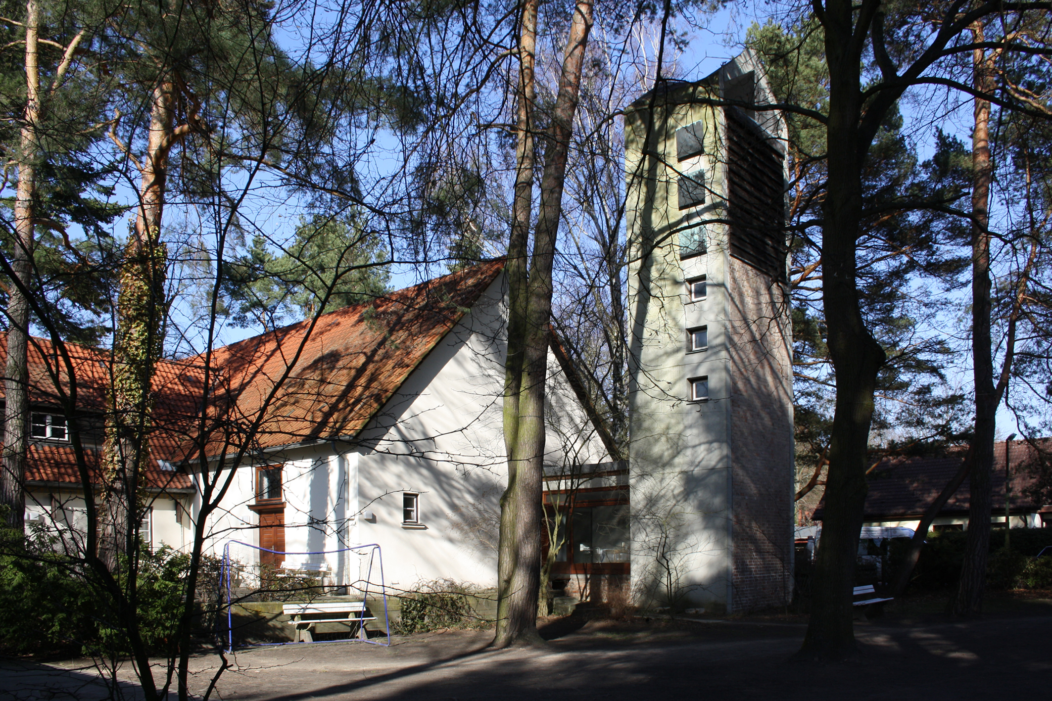 Glockenturm der Matthias Claudius Kirche